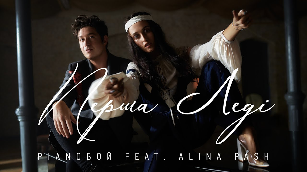 Зображення з відео "Перша Леді" Pianoбой і Alina Pash